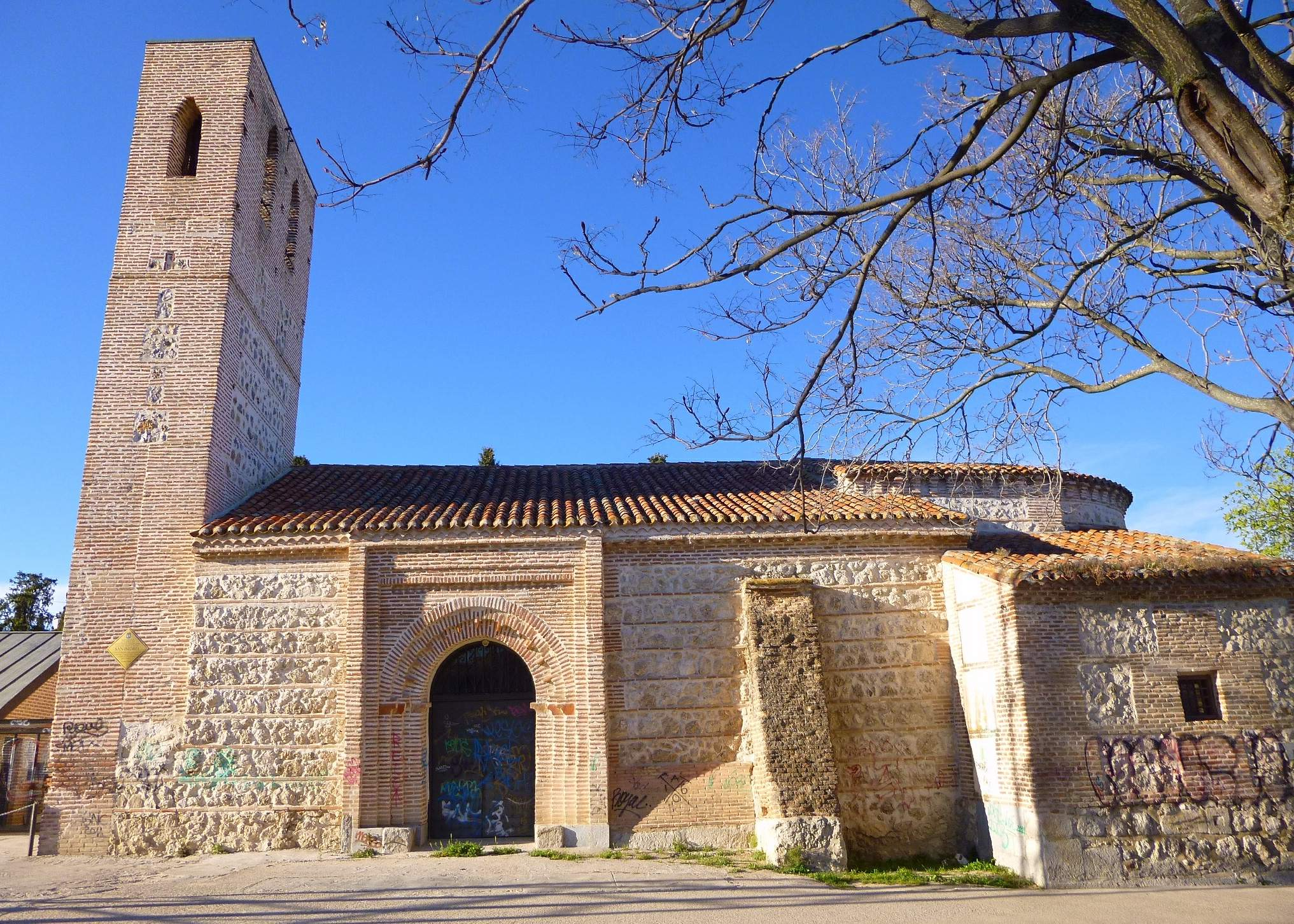 Ermita de Santa María la Antigua (Carabanchel, Madrid)